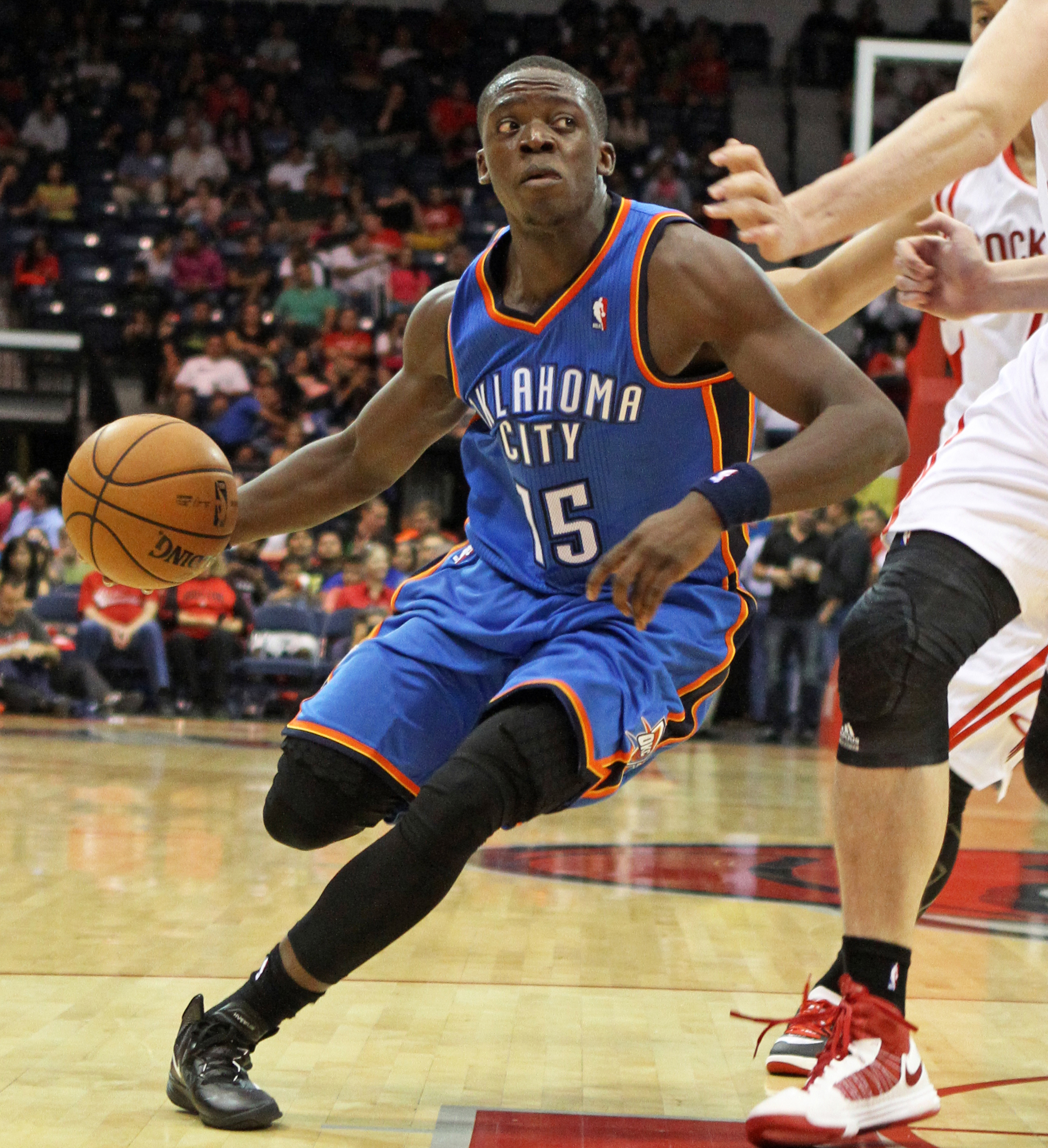 Reggie Jackson